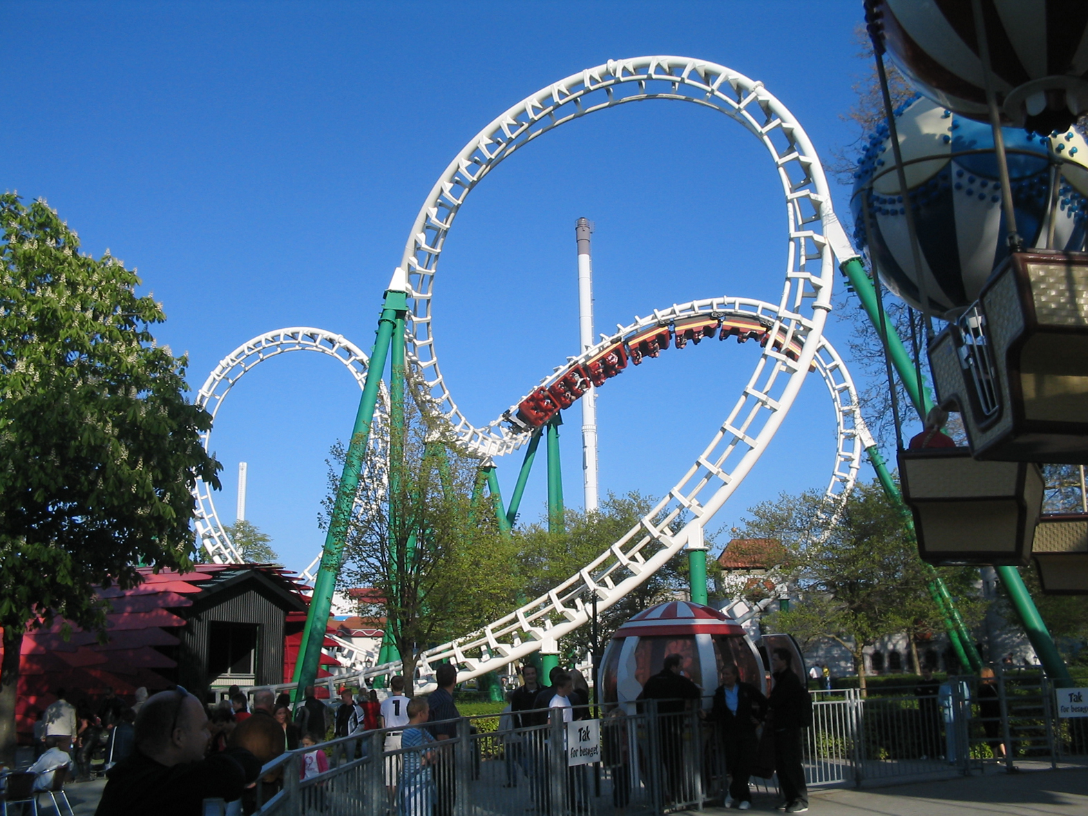 Picture taken at Karolinelund, Aalborg, Denmark